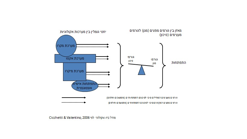 מודל ביו אקולוגי